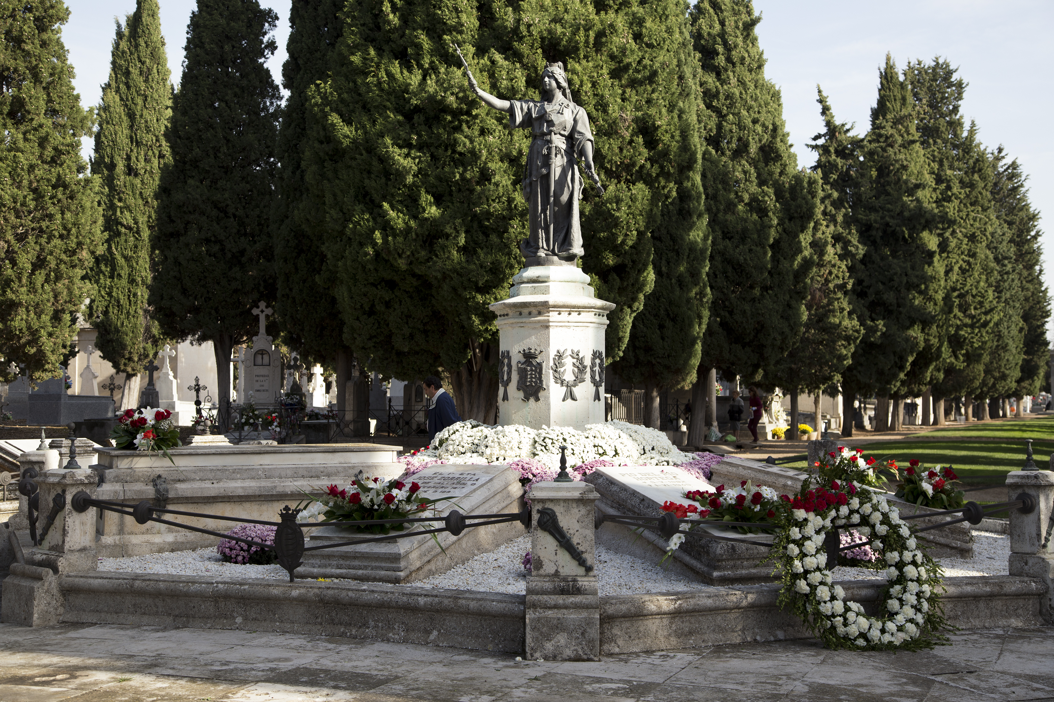 Fotografía: Ángel Cantero | 1-11-2014 - El Deán de la S. I. Catedral de Valladolid, D José Andrés Cabrerizo, junto al alcalde, D. Javier León de la Riva y concejales de la Corporación Municipal han visitado, esta mañana, el cementerio de El Carmen, con motivo de la festividad de Todos los Santos y los Files Difuntos.